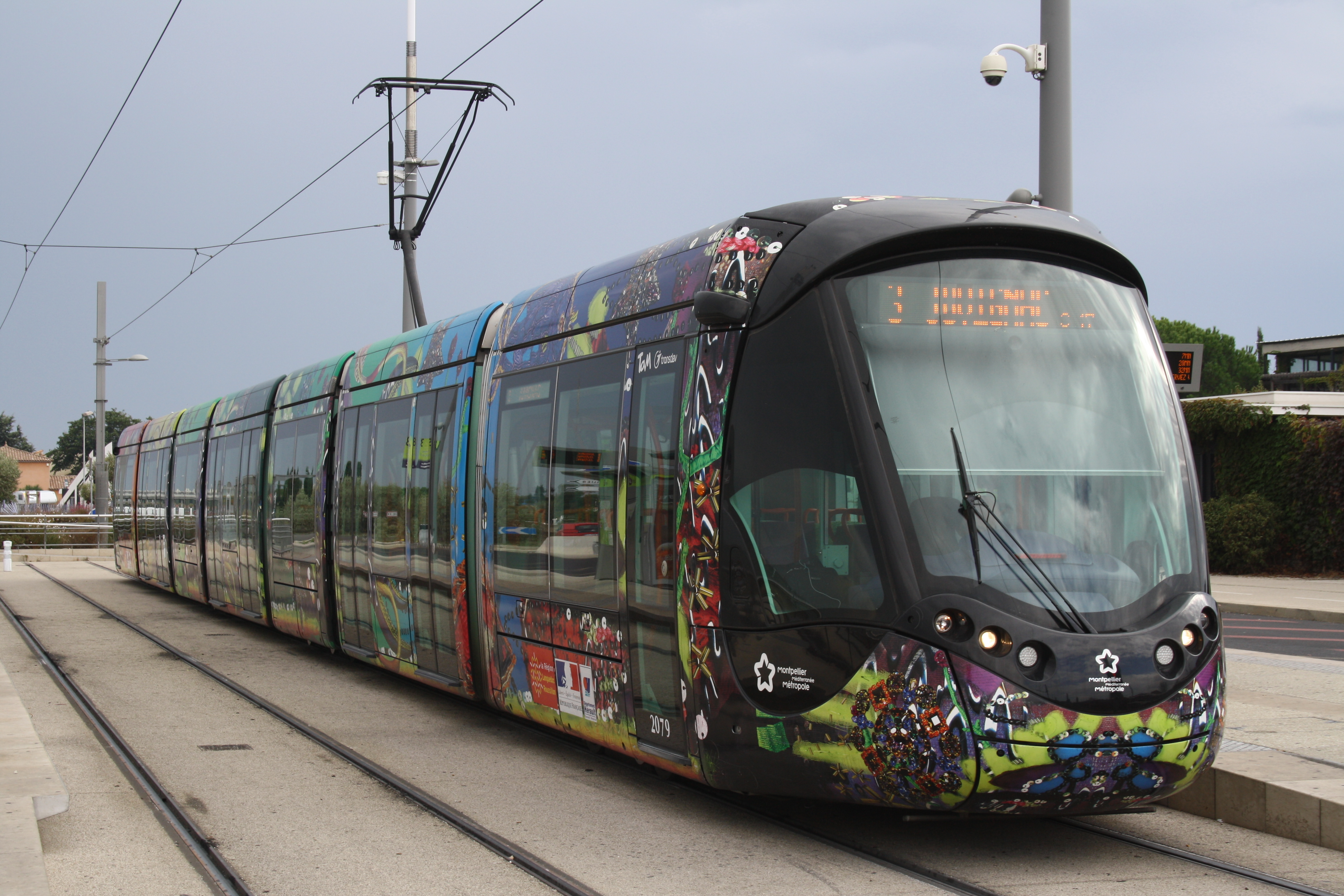 Terminus Pérols - Étang de l'Or du tramway de Montpellier